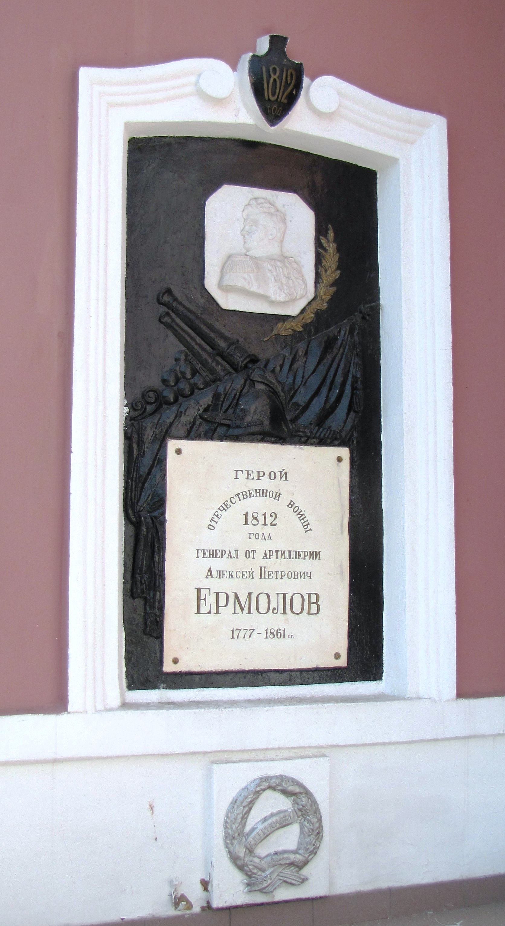 Фамильная усыпальница Ермоловых, Свято-Троицкая церковь, г. Орел. Здесь похоронен Алексей Петрович Ермолов.